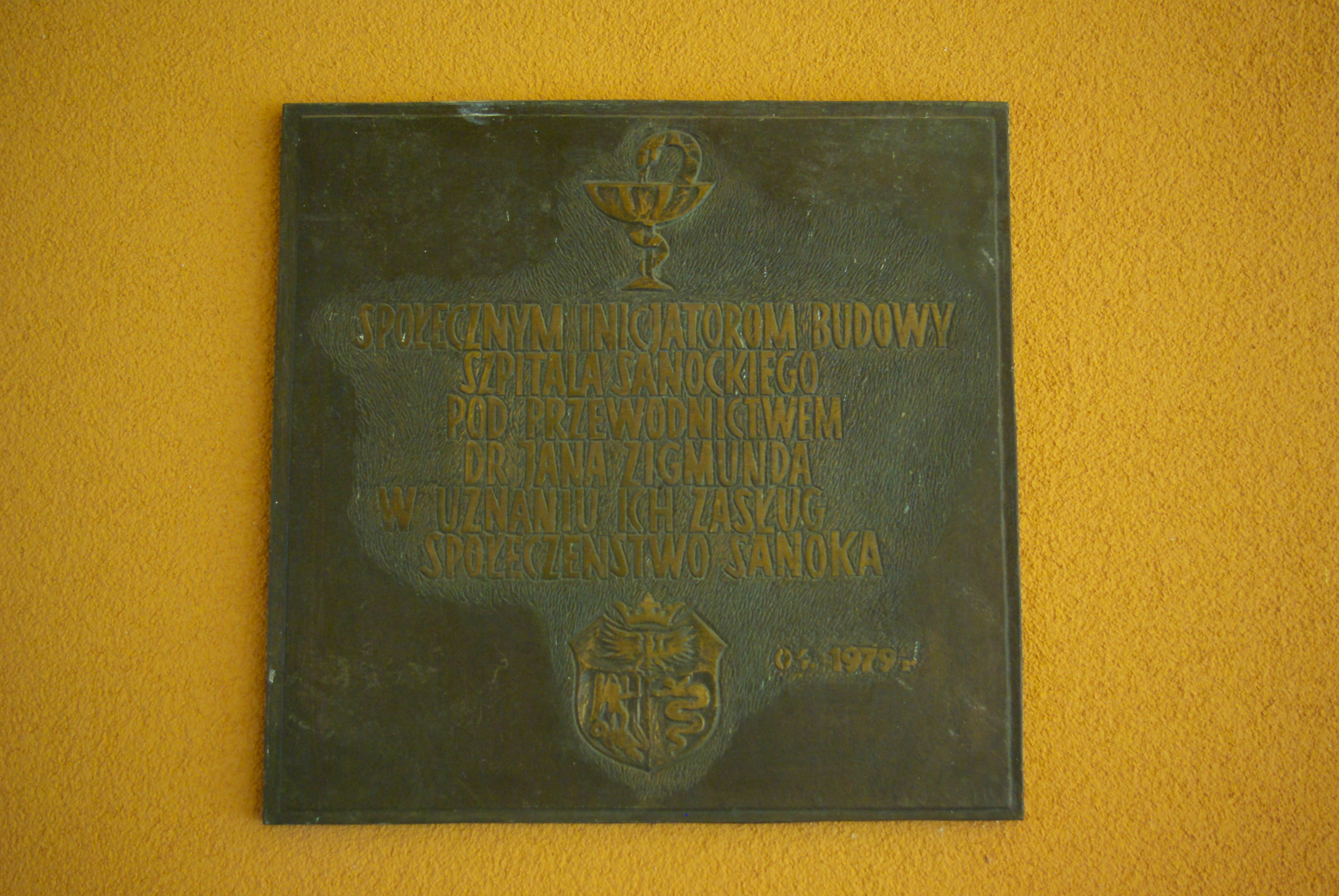 Tablica pamięci budowy szpitala w Sanoku i dra Jana Zigmnuda